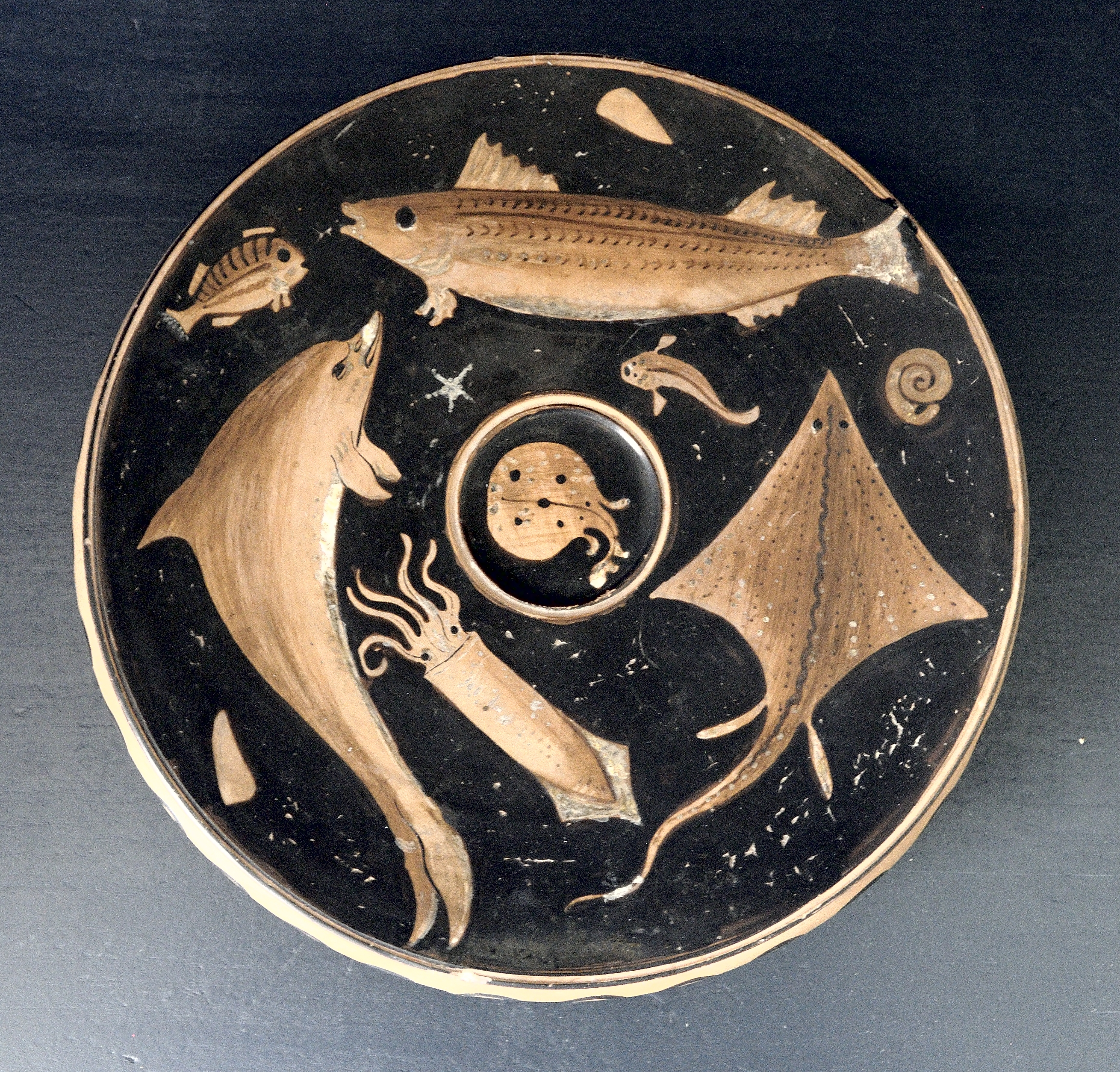 Objekt im Antikenmuseum der Universität Heidelberg. Apulischer Fischteller (Heidelberg U 23)